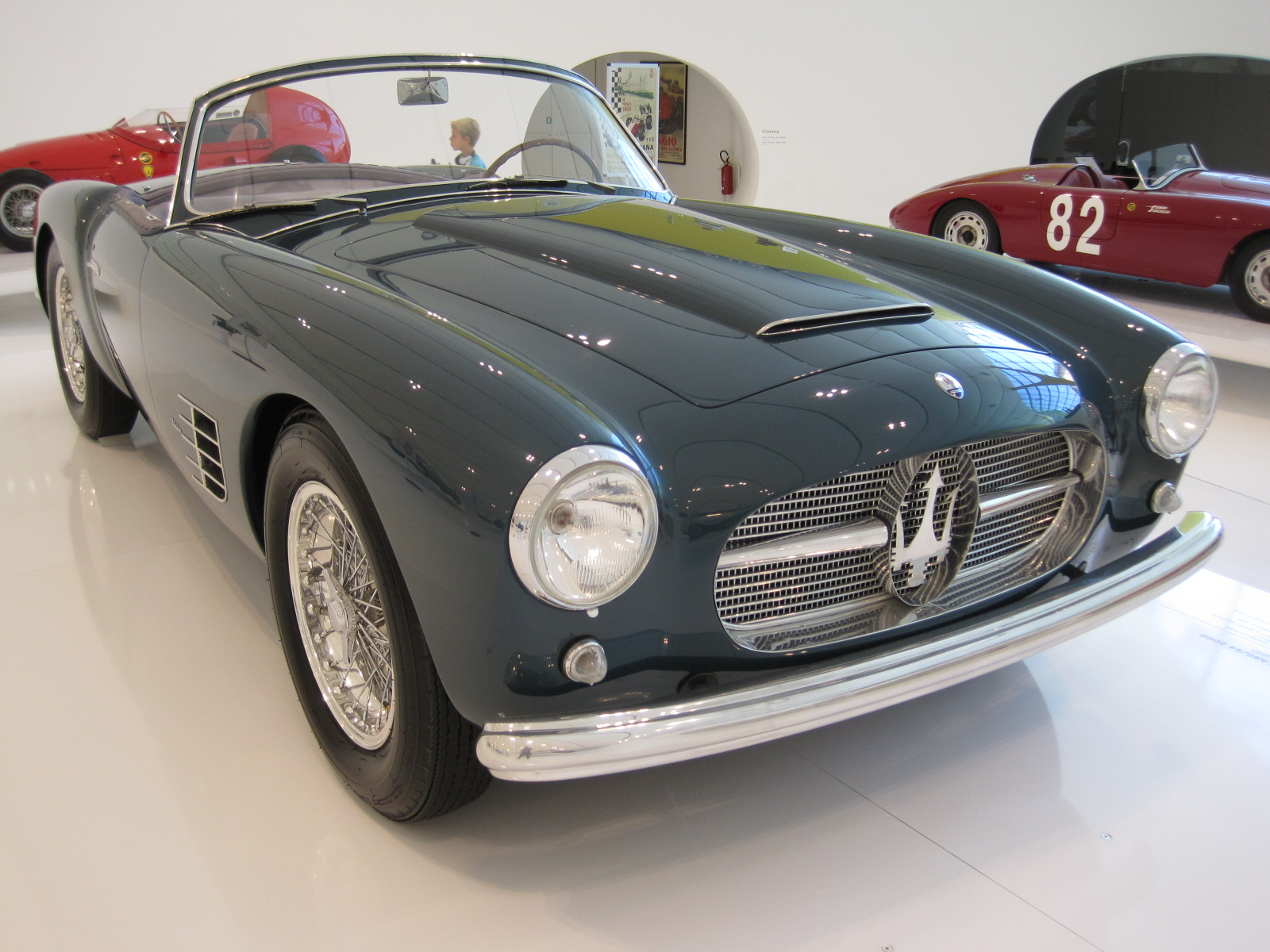 Automobiles in Enzo Ferrari Museum in Modène - Maserati A6G/54 2000 - Spider Zagato - 6 cylindres - 1955